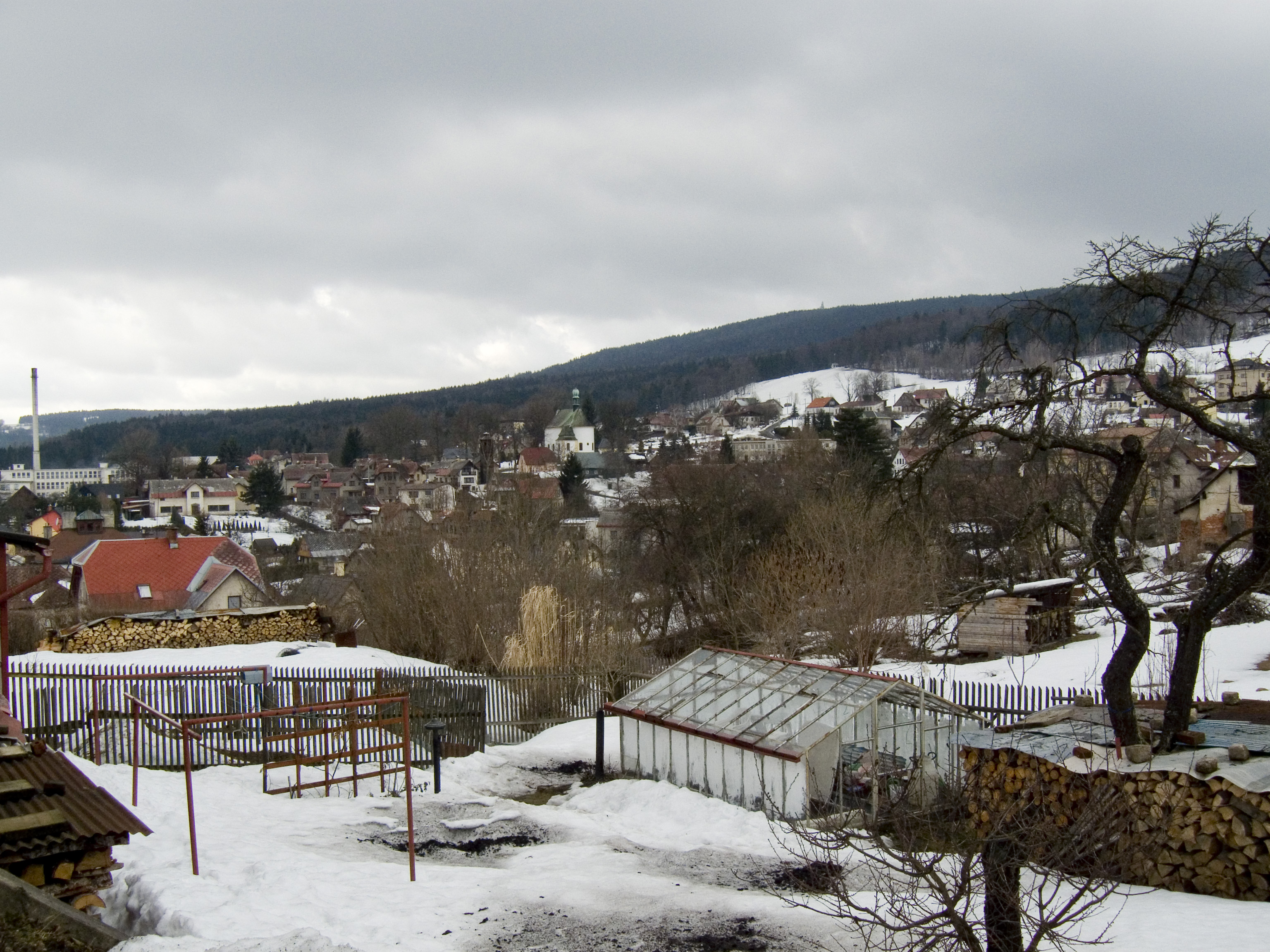 Zásada (Jablonec n. N.)